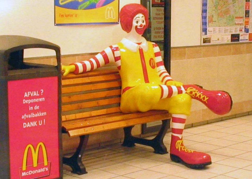 Ronald McDonald (Delft, Netherlands)